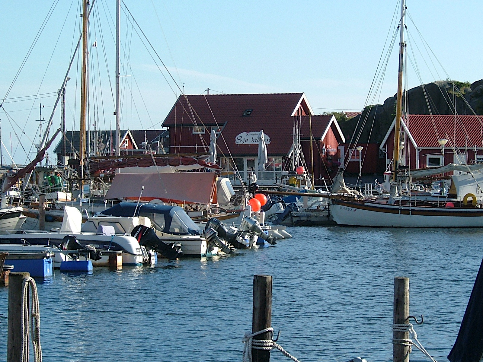 Skjærhalden